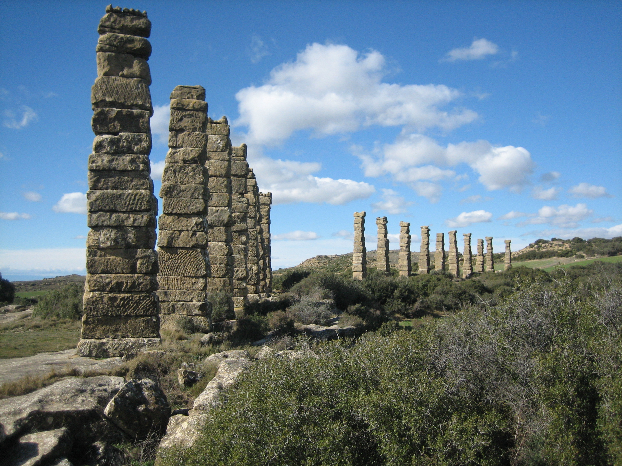 concurso foto RI-55-0000063 Los Bañales, Uncastillo Zaragoza